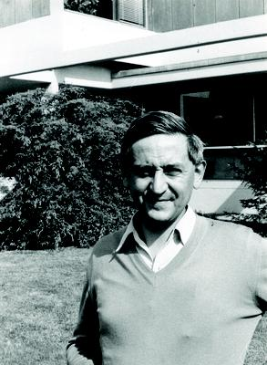 Foto di Xavier Fernique